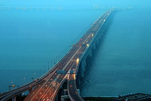 El puente desde el helicoptero